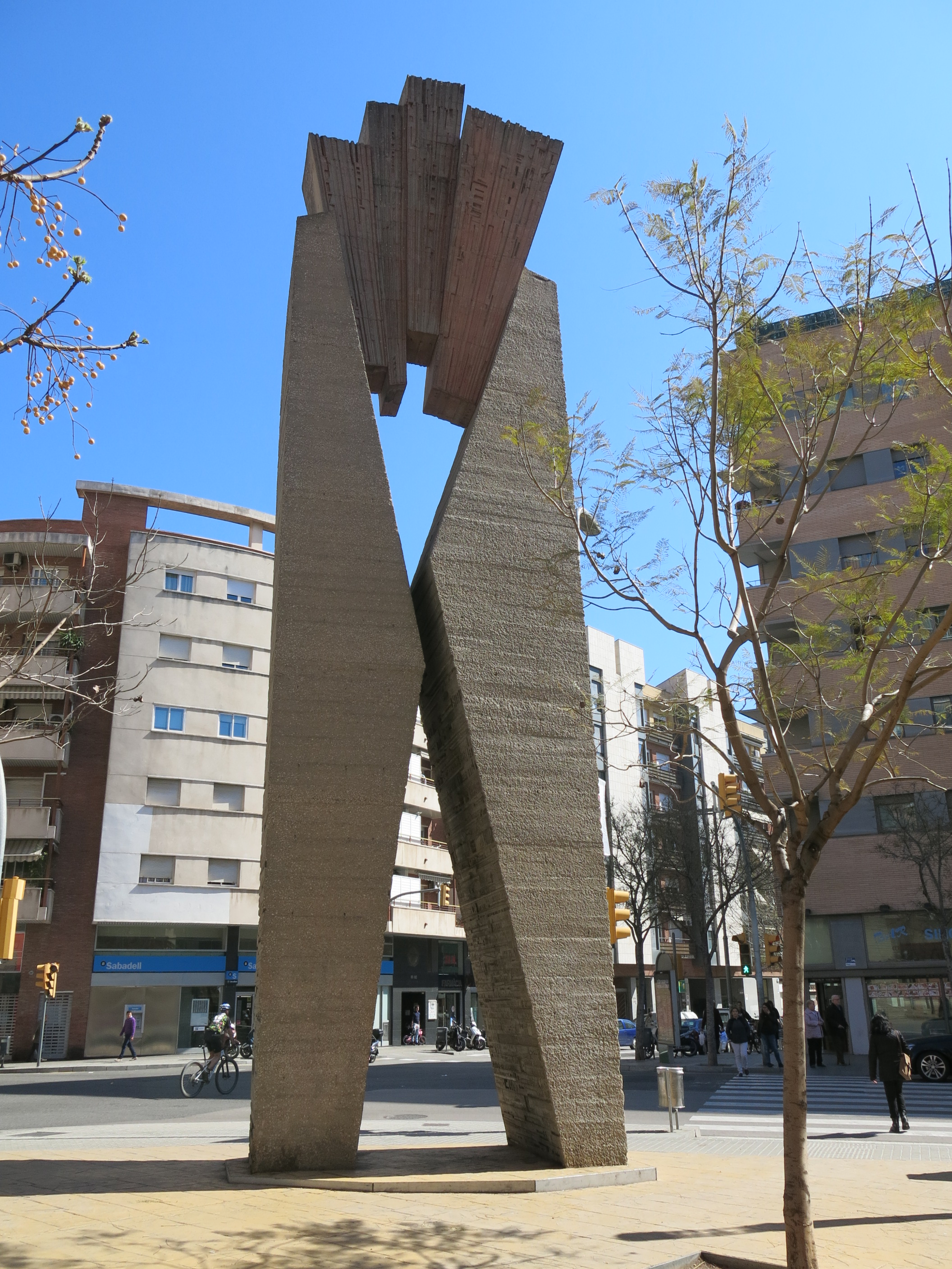 Escut de l'Hospitalet (l'Hospitalet de Llobregat)